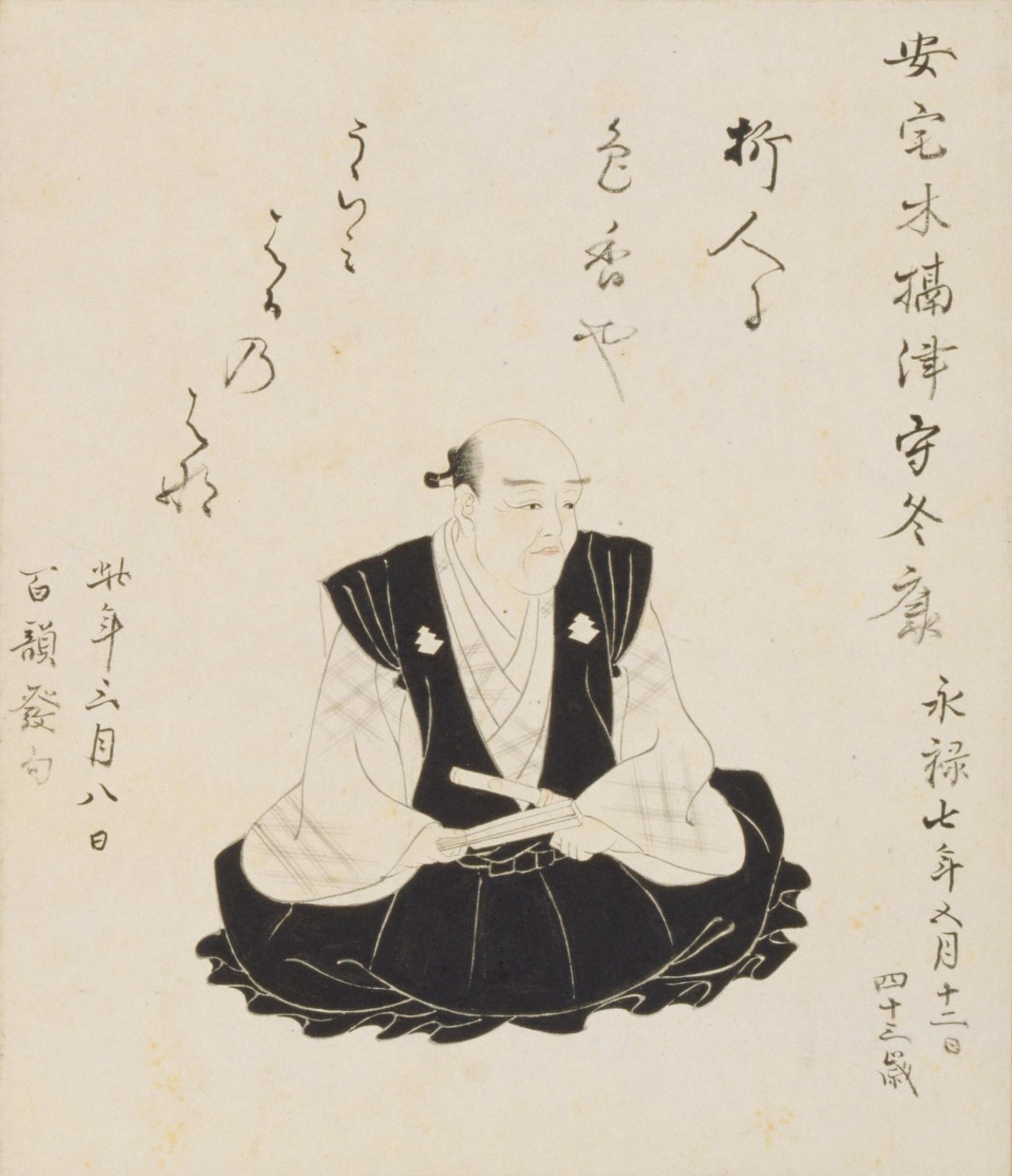 安宅冬康の肖像。